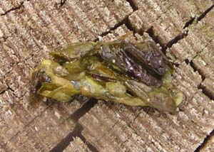 Emys orbicularis excrements